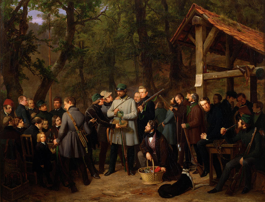 Friedrich Boser und Carl Friedrich Lessing: Das Vogelschießen der Düsseldorfer Künstler im Grafenberger Wald 1842–1844 Öl auf Leinwand 81 × 104,7 cm New-York Historical Society